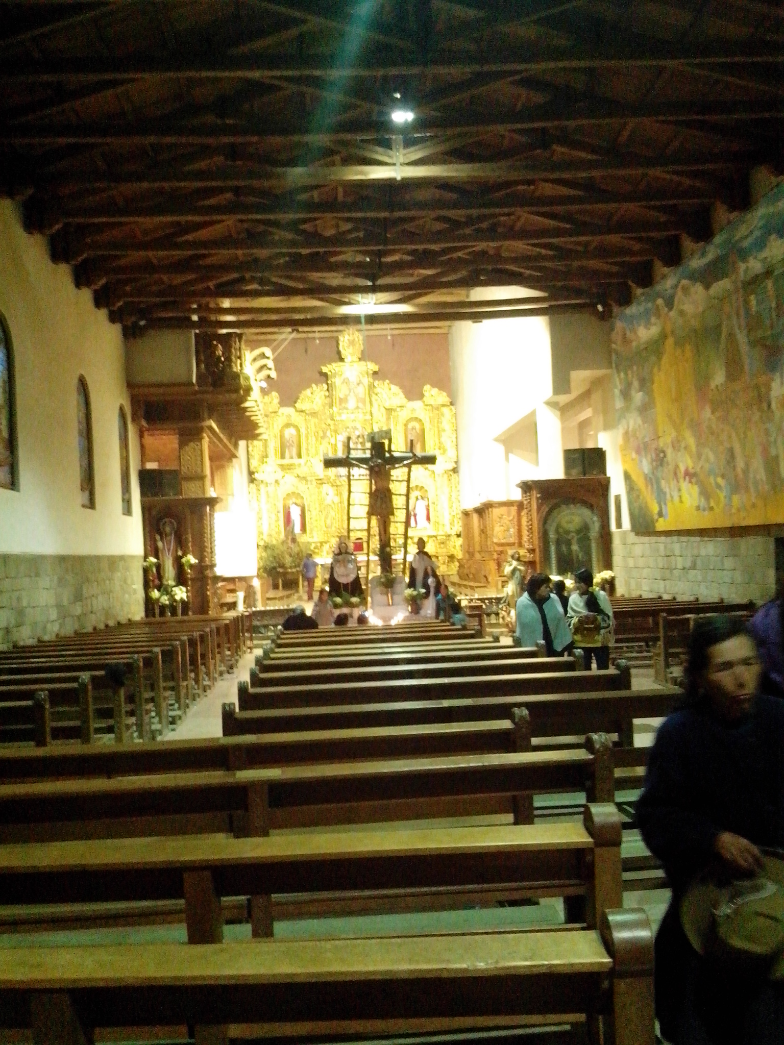 Cristo crucificado en el Viernes Santo - Chacas, Ancash, Perú